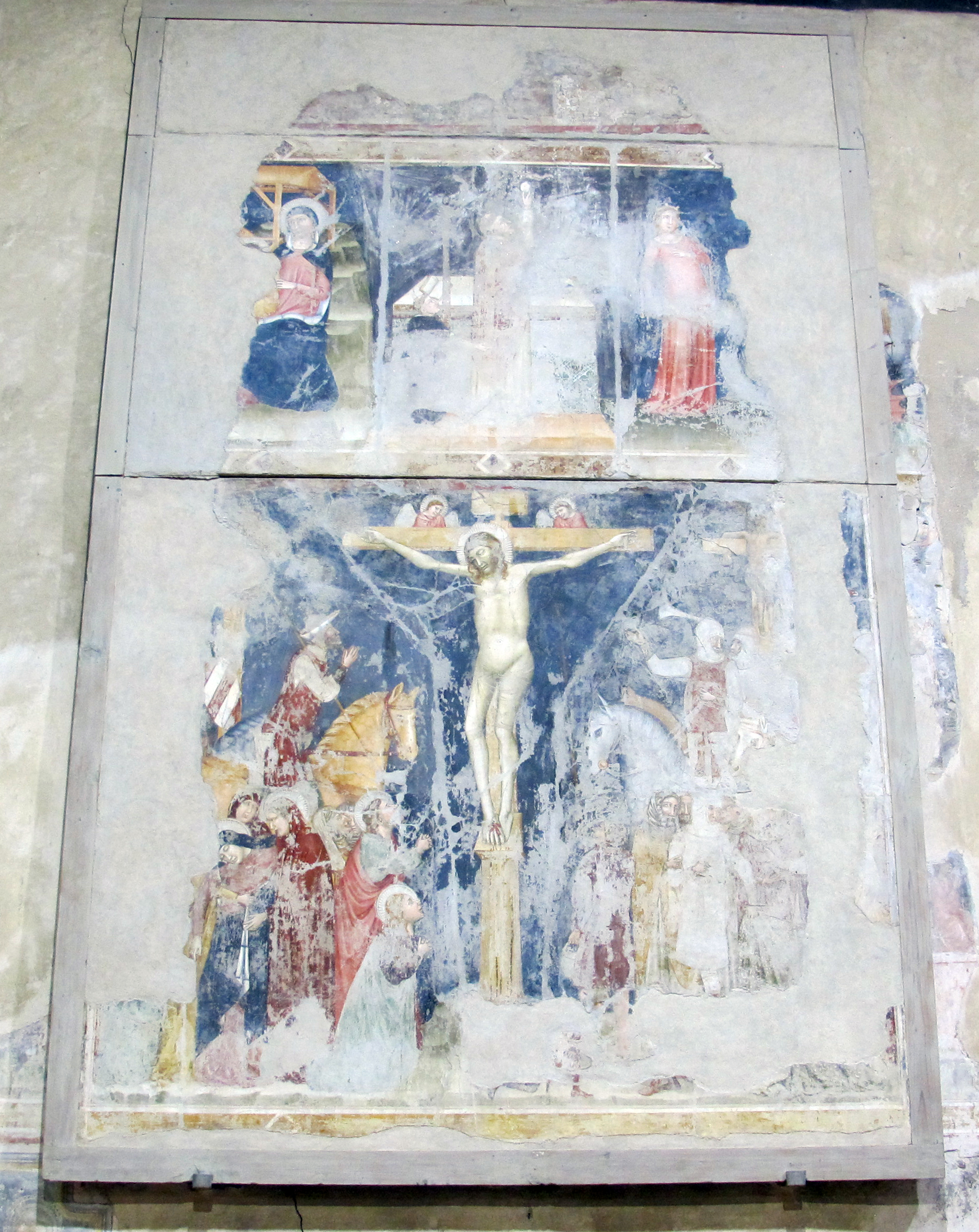 Verona, Italia